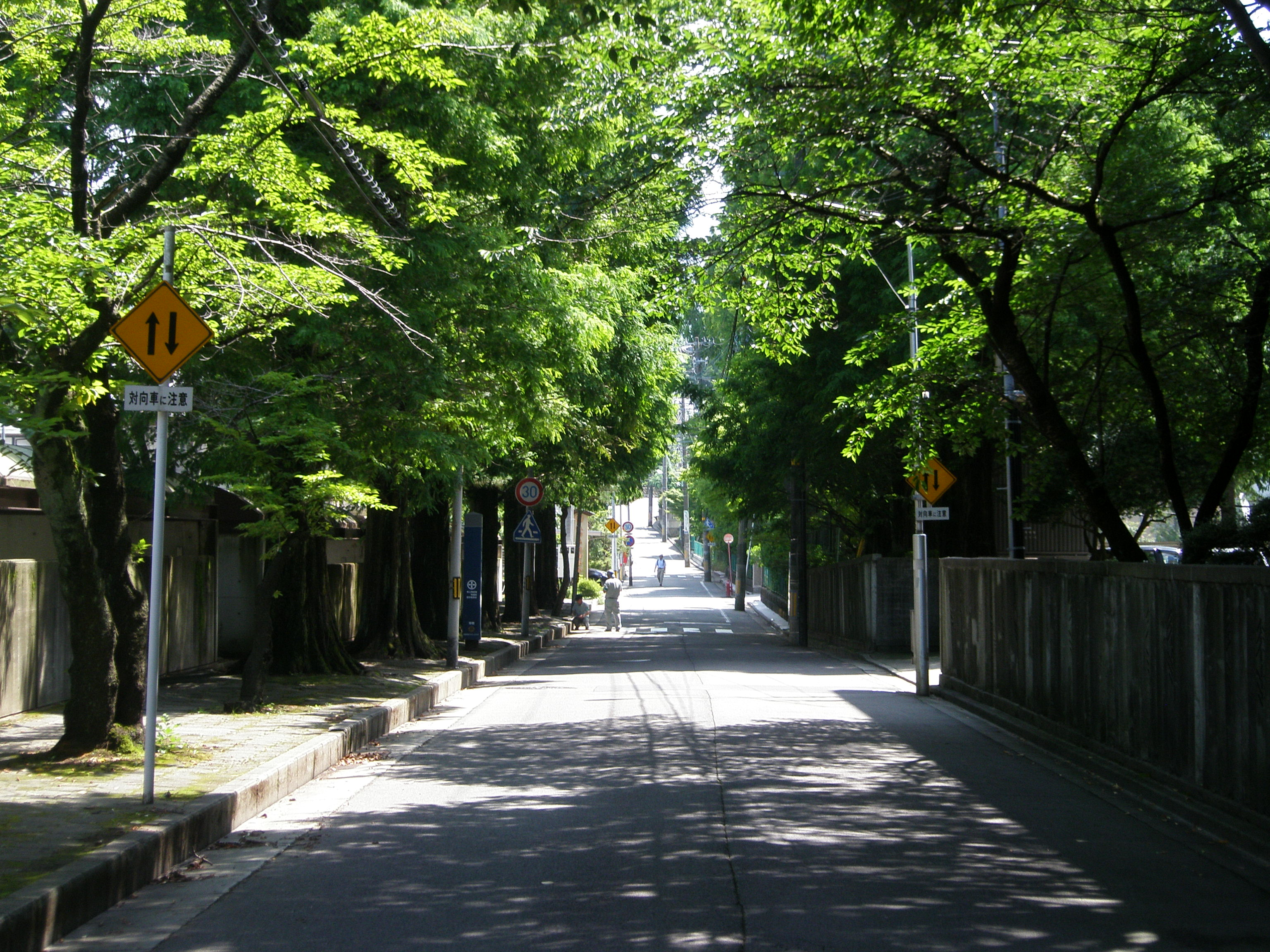 明徳館小路（秋田県秋田市）